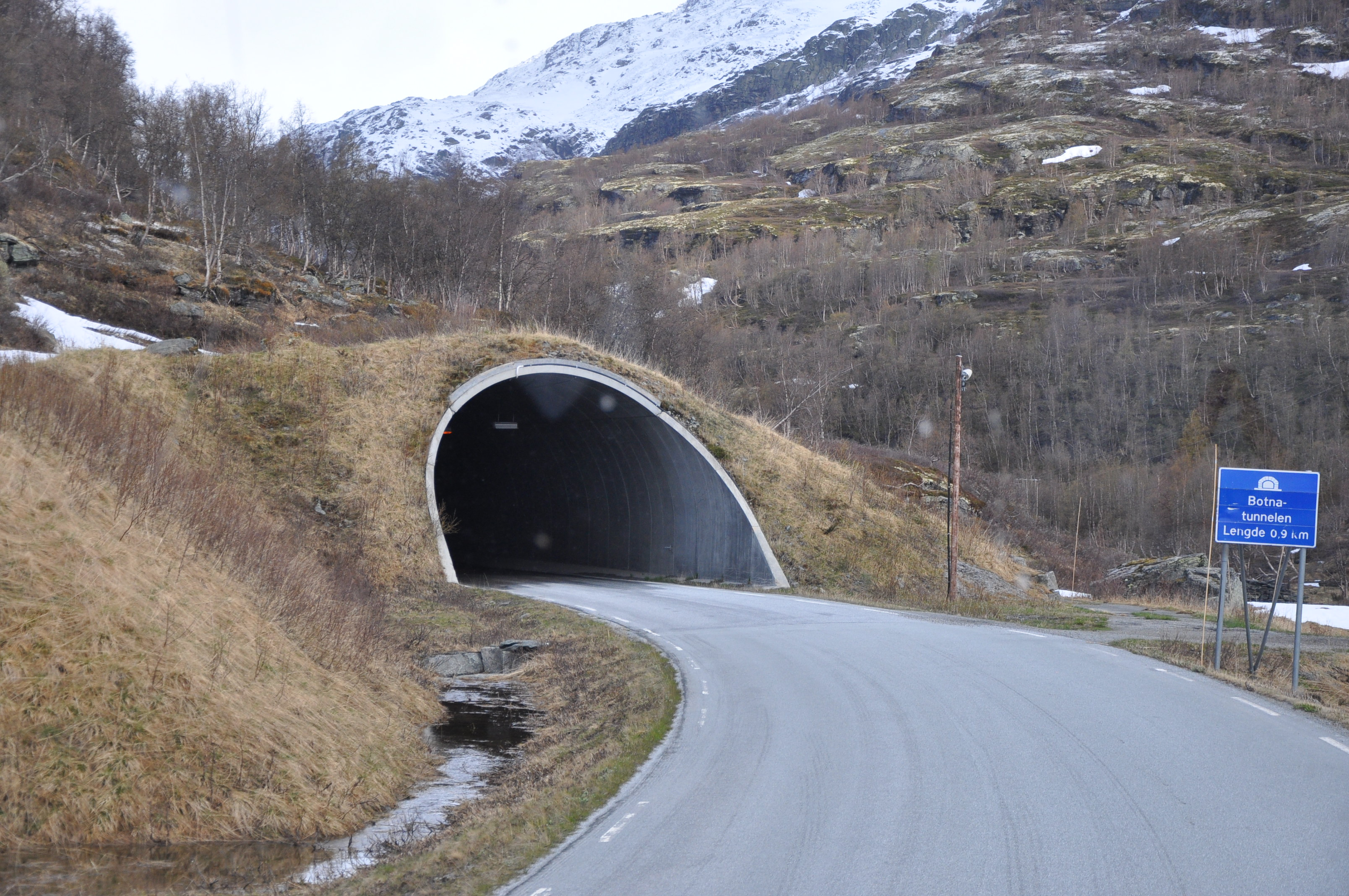 Austre innkøyring til Botnatunnelen på Riksveg 50